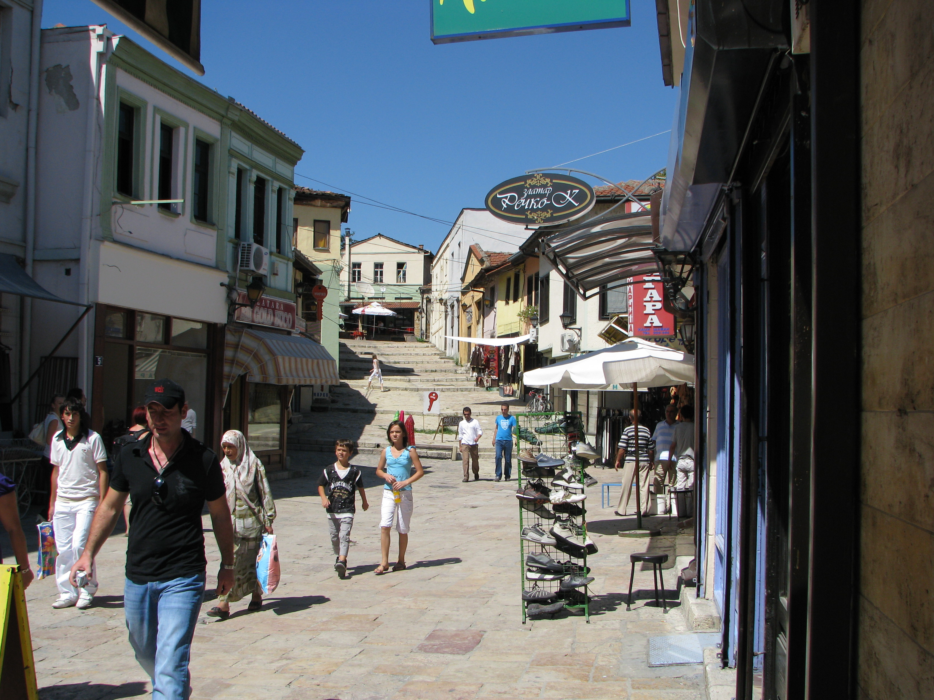 Skopje old town